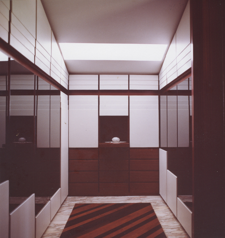 Casa Emme, Ravenna. Cabina guardaroba